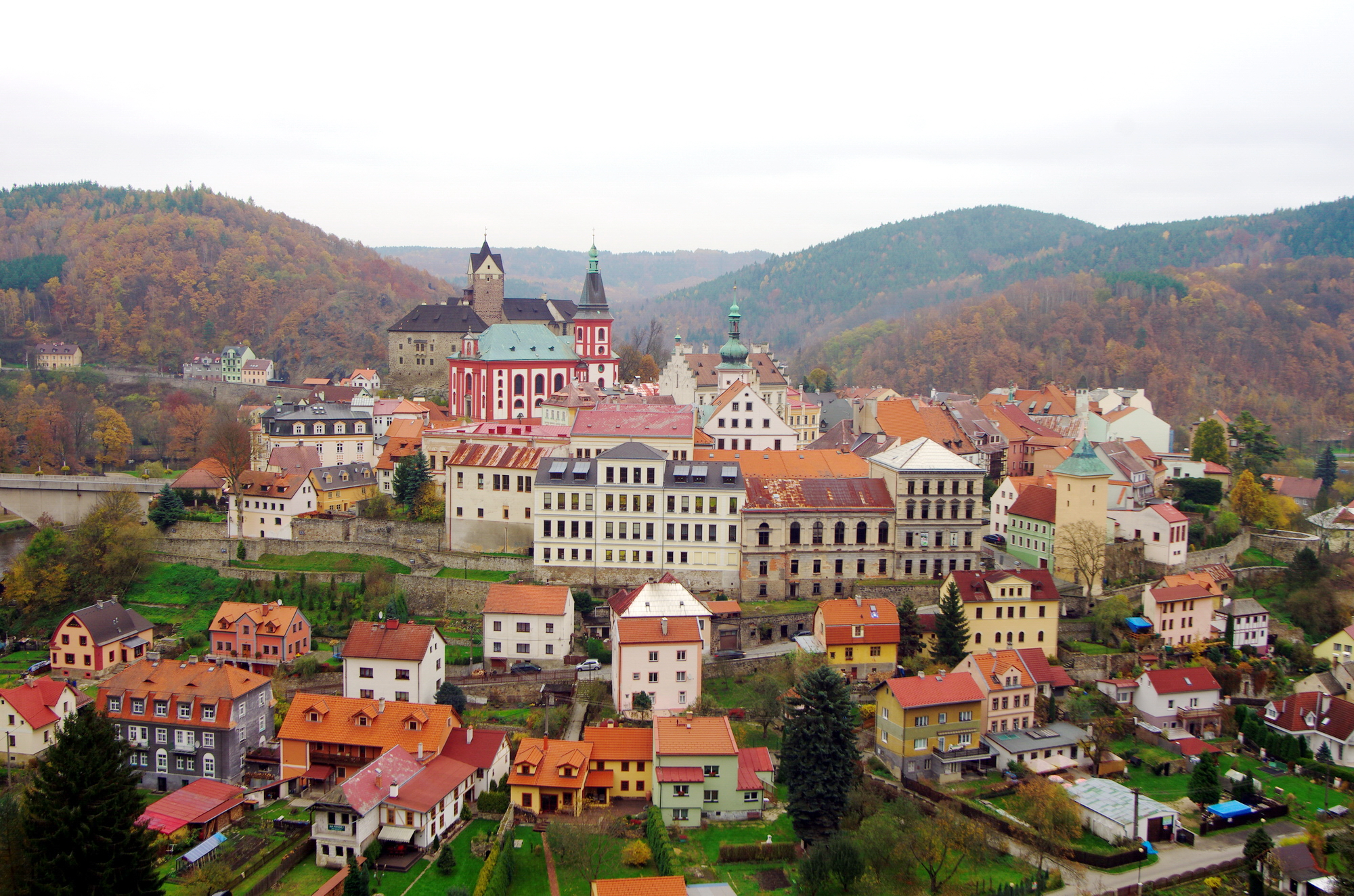 pohled na Loket, okres Sokolov